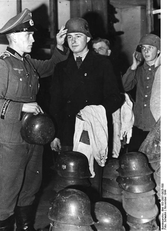 Einkleidung Kriegsfreiwilliger Scherl Bilderdienst "Großdeutschland" - Kriegsfreiwillige rücken ein. Die durch nichts zu erschütternde Siegeszuversicht des Deutschen Volkes kann nicht besser gekennzeichnet werden als durch die Tatsache des unaufhörlichen Freiwilligenstromes, der jetzt auch im 6. Kriegsjahr den verschiedenen Waffengattungen zuströmt. Täglich rücken in Arbeitsdienst, in Wehrertüchtigungslagern und anderen vormilitärischen Lehrgängen der HJ bestens vorgebildete junge Männer in den Waffendienst ein. Von fronterfahrenen Ausbildern mit den neuesten und besten Waffen ausgebildet werden sie in absehbarerZeit an der Front stehen. UBz. Der erste Tag in der Kaserne. Die Einkleidung auf der Kammer. Aufnahme: Schwahn 1801-44 Aufnahme: Schwahn 26.11.44 "Grossdeutschland" -Kriegsfreiwillige rücken ein Vortext siehe P 1019 UBz. Der erste Tag in der Kaserne. Die Einkleidung auf der Kammer. [Deutschland, Unteroffizier des Regiments Großdeutschland verpaßt den Kriegsfreiwilligen die Helme.]